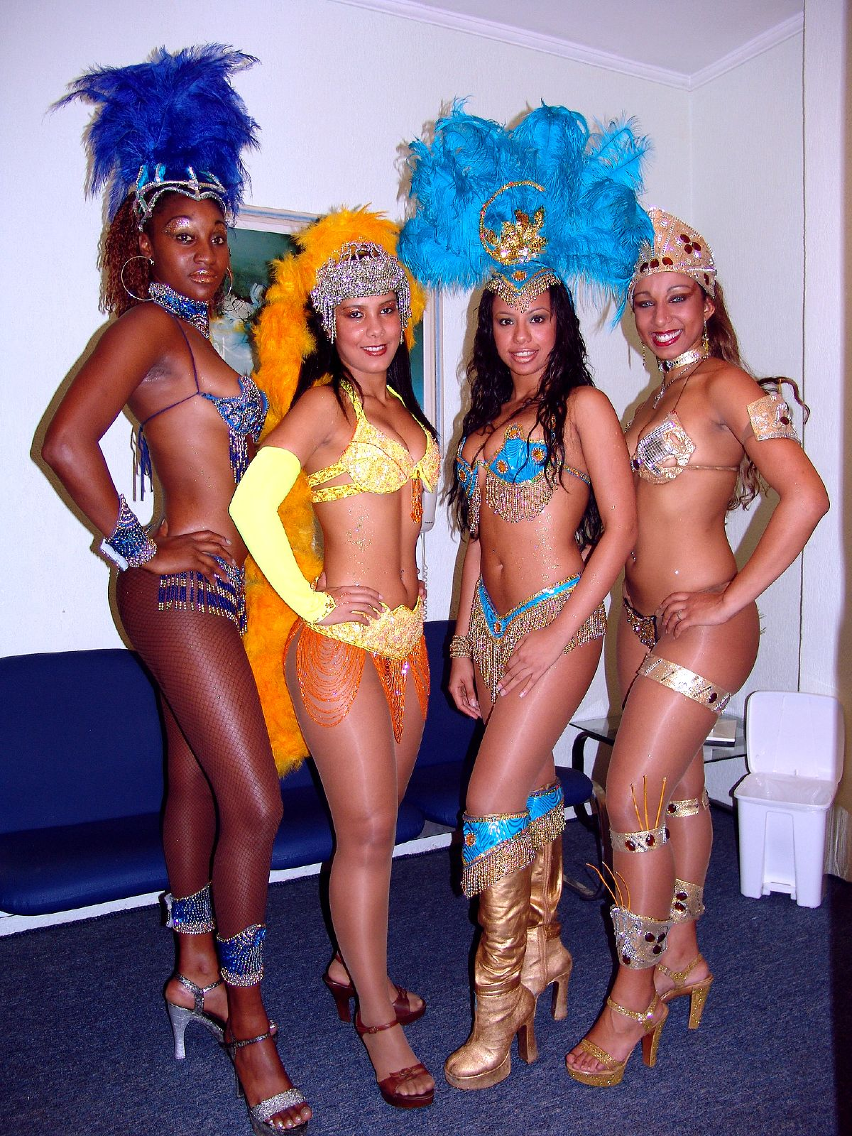 Criolé Show - Samba dancers.